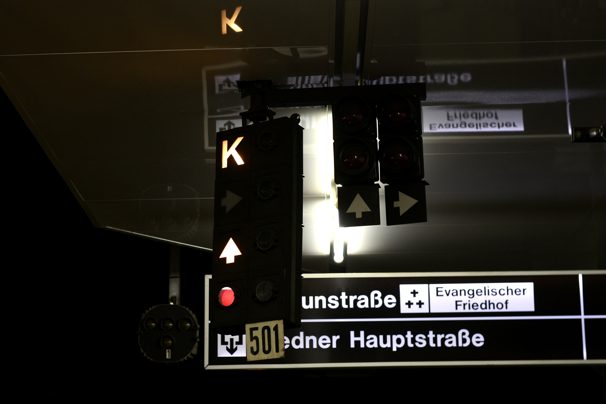 Signalanlage 1 in der Ustrab-Station Matzleinsdorfer Platz